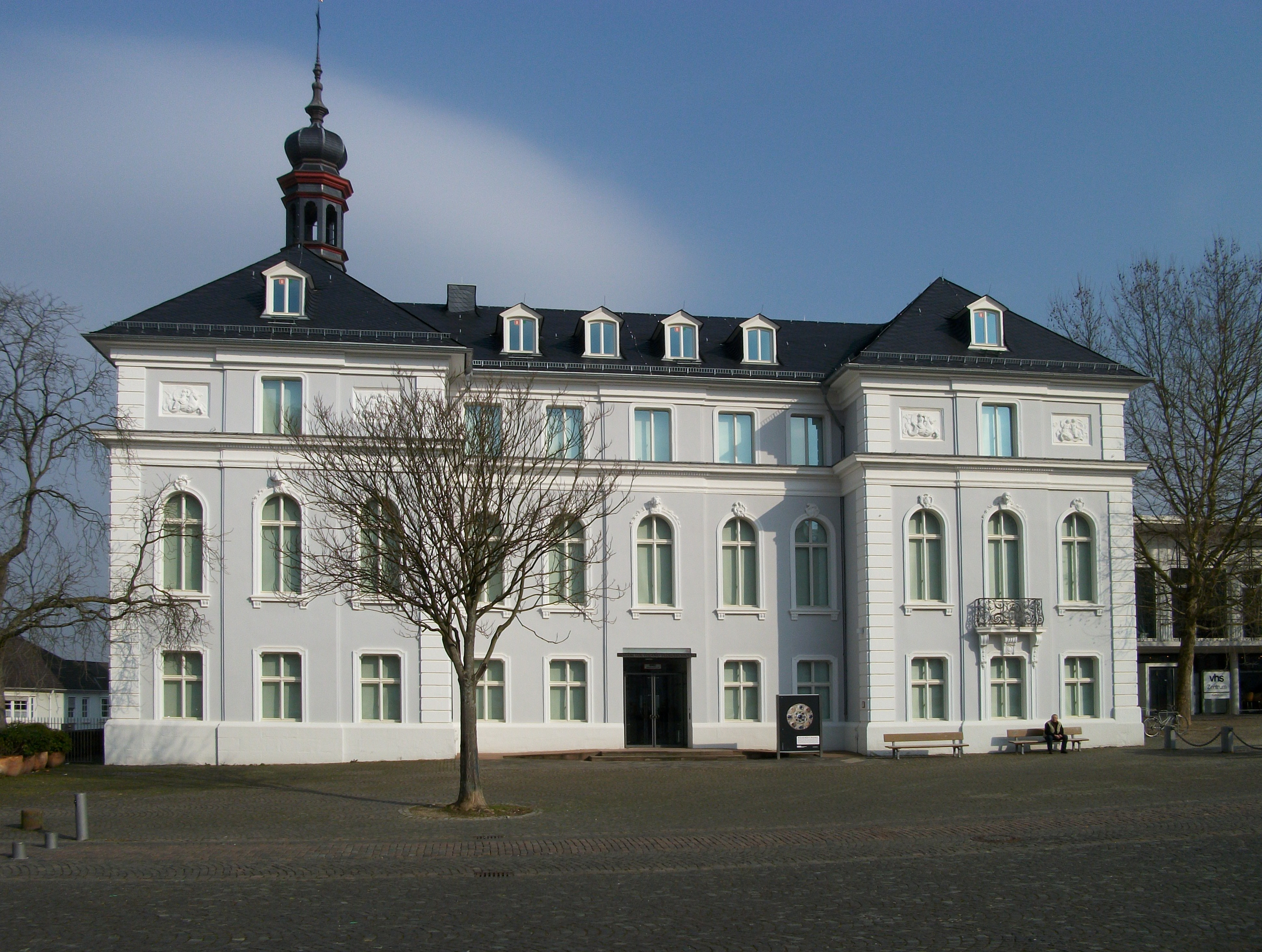 Museum für Vor- und Frühgeschichte und Alte Sammlung (Saarbrücken)